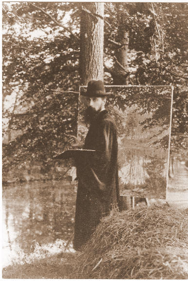 Raymond de la Haye in de Nazarethdreef te Lier